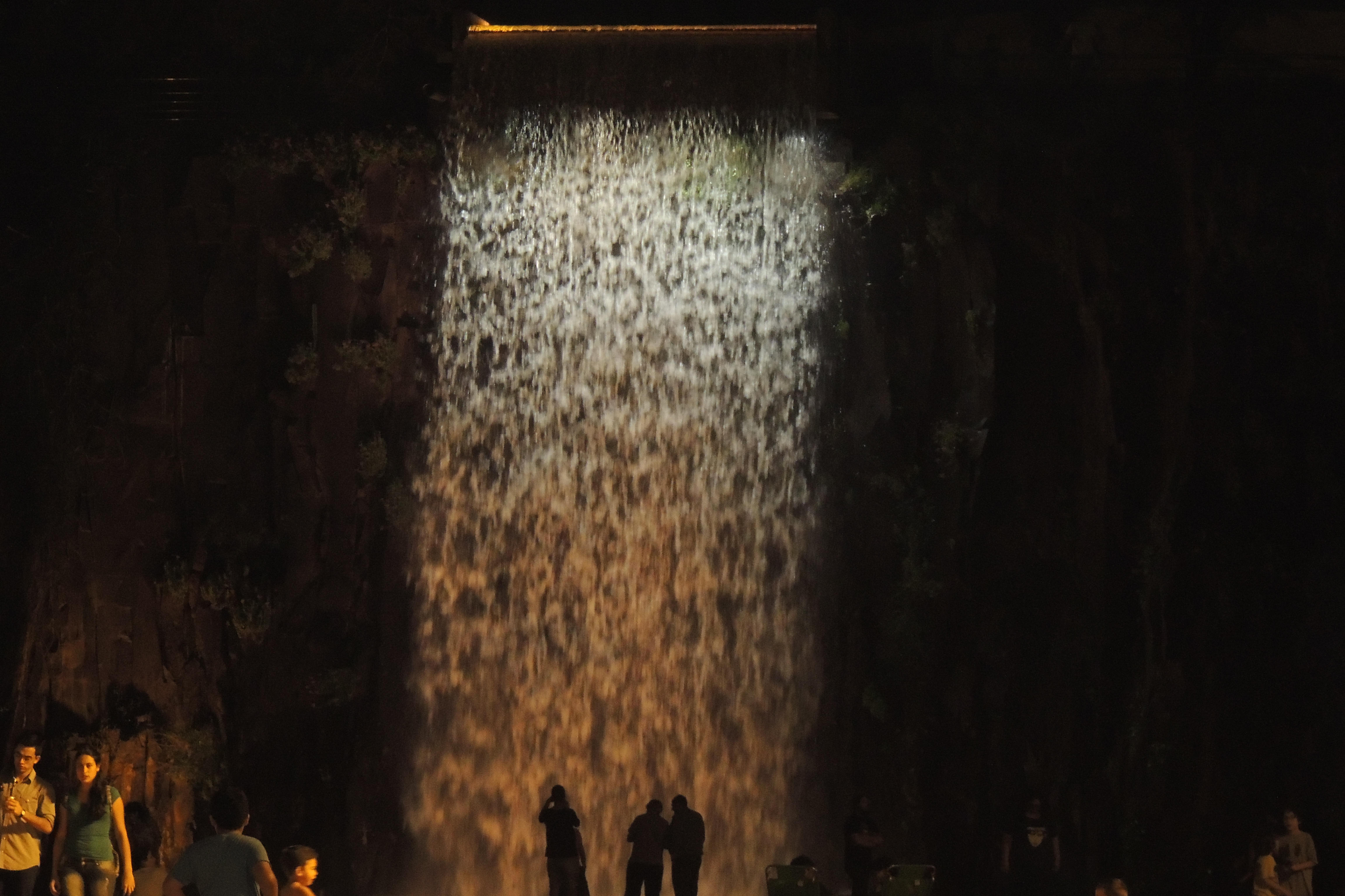 Cascada artificial en la ex cantera